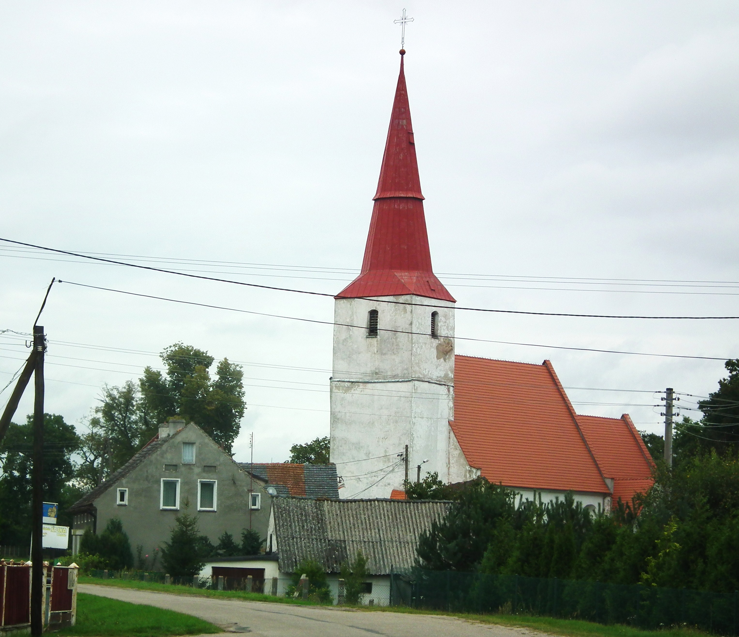 Kościół św. Michała Archanioła w Chichach.